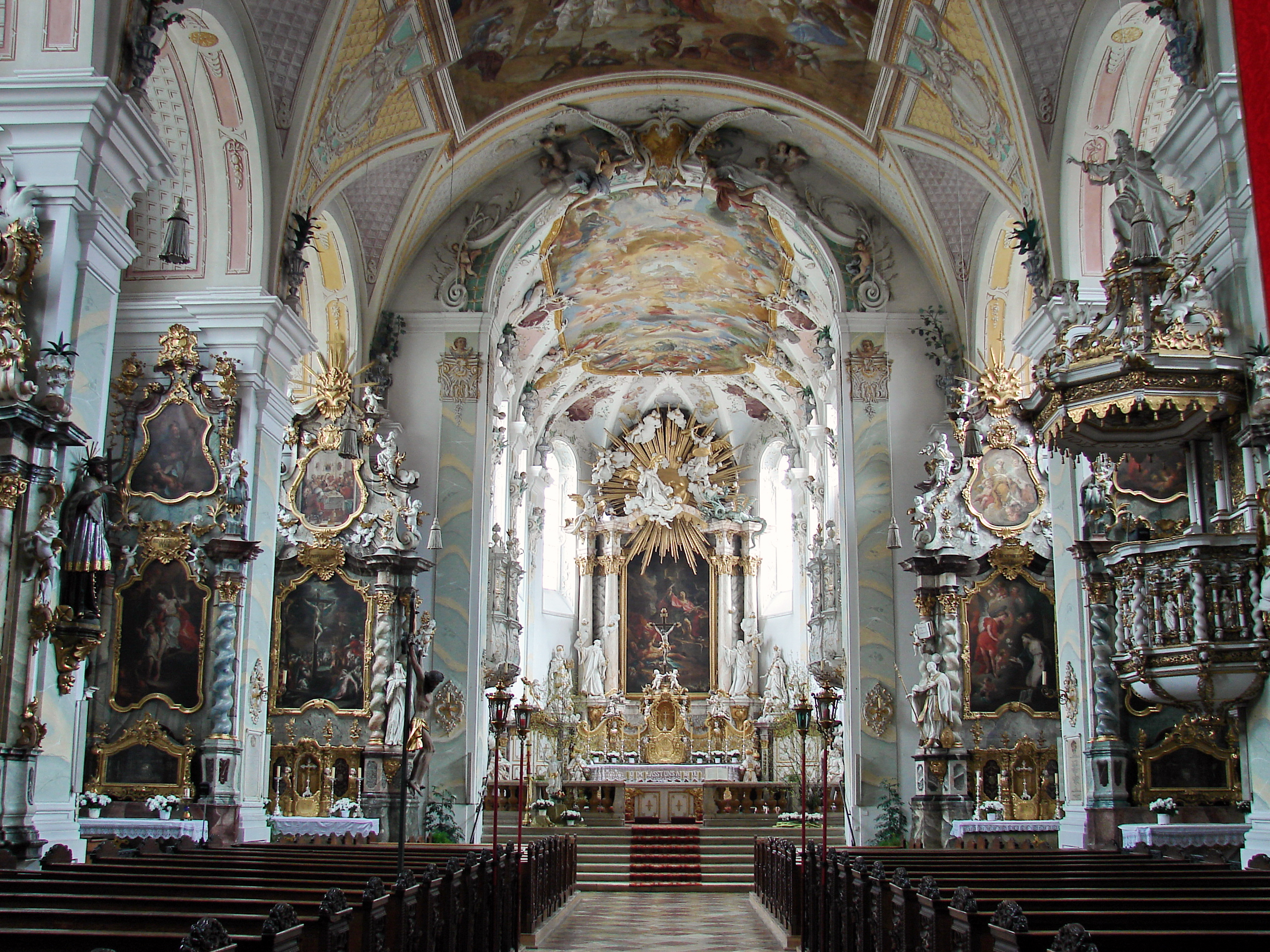 Die dem Kloster angehörige Basilika wurde 1109 begonnen und erhielt in der Mitte des 18. Jahrhunderts ihre heutige Rokokoausstattung. In der Pfarrkirche St. Johannes befindet sich ein Hochaltar von Ignaz Günther.